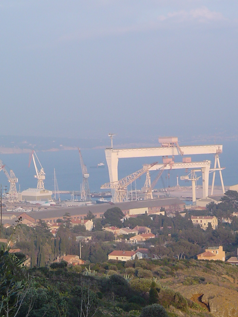 portiques des chantiers navals de La Ciotat